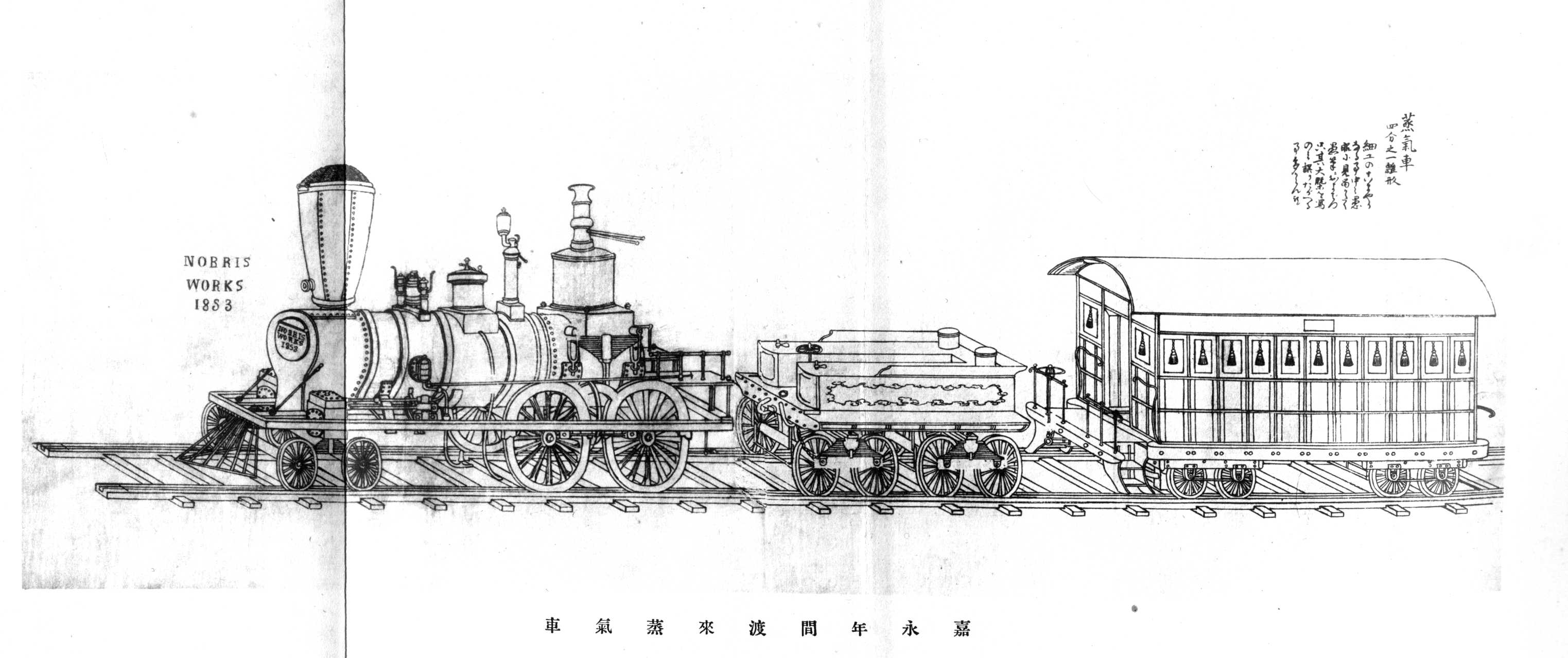 嘉永年間渡来蒸気車 米国使節渡来の当時横浜村応接所の守備に任ぜし松代藩士中に樋端翁輔あり、藩の命を承け観る所を図にして巻と為し之を藩主に報告したり、本図は其巻中に在るものにして巻は息樋端正太郎氏の所蔵に係り特に本史の為本図を撮影して寄贈されたるものなり、該蒸気車の寸法は本図に「四分の一雛型」とあるも固より精密のものに非ず、明治42年6月横浜開港五十年記念資料展覧会に出陳したる下岡蓮杖氏所蔵張雑屏風に該機関車の絵紙二枚あり、其一に「高さ1丈幅7尺2寸長1丈1尺5寸腰板唐木唐かねのほりあり柱高欄付朱ぬり金物ほりみすは針線にて縁通し羅紗文様縫いあり同ふさは皮にて色紫金うちまぜ家根羊皮黒塗うちは朱塗大車指渡し1尺3寸小車67寸」とあり、右は客車の説明にして大車1尺3寸は炭水車を指すものならん、其二に「長さ8尺横5尺小車3尺大車6尺」とあるは機関車を指すものの如く3尺6尺は円周尺なるべし。